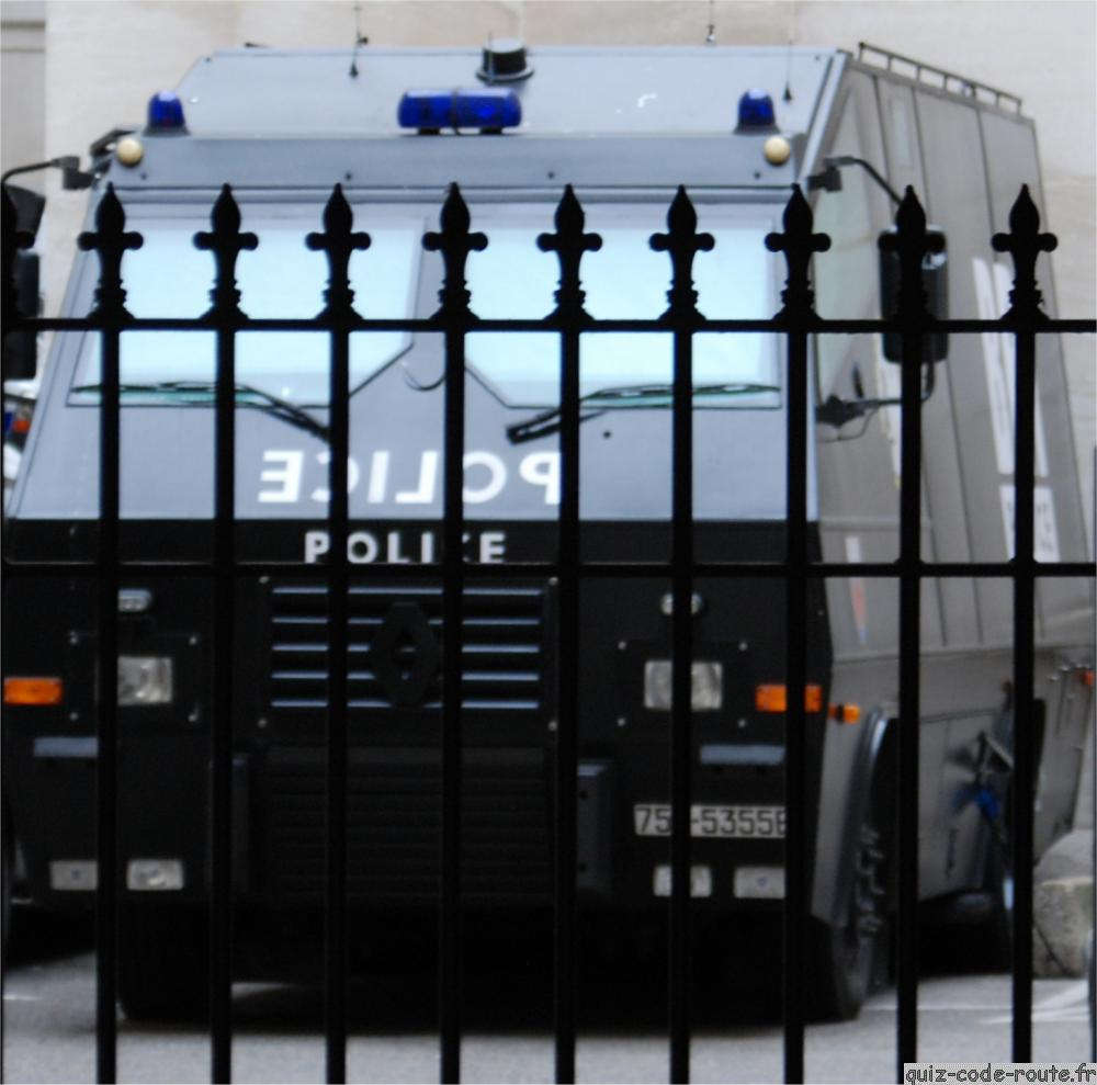 Vehicule blindé de la Brigade de Recherche et d'Intervention de la préfecture de police de Paris stationné au palais de Justice de Paris